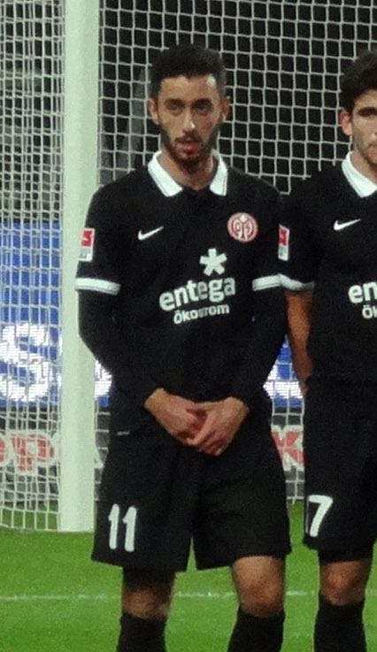 VfL Wolfsburg - Mainz 05 3:0 26.10.2014, Volkswagen Arena Deutsche Bundesliga - Freistoß De Bruyne